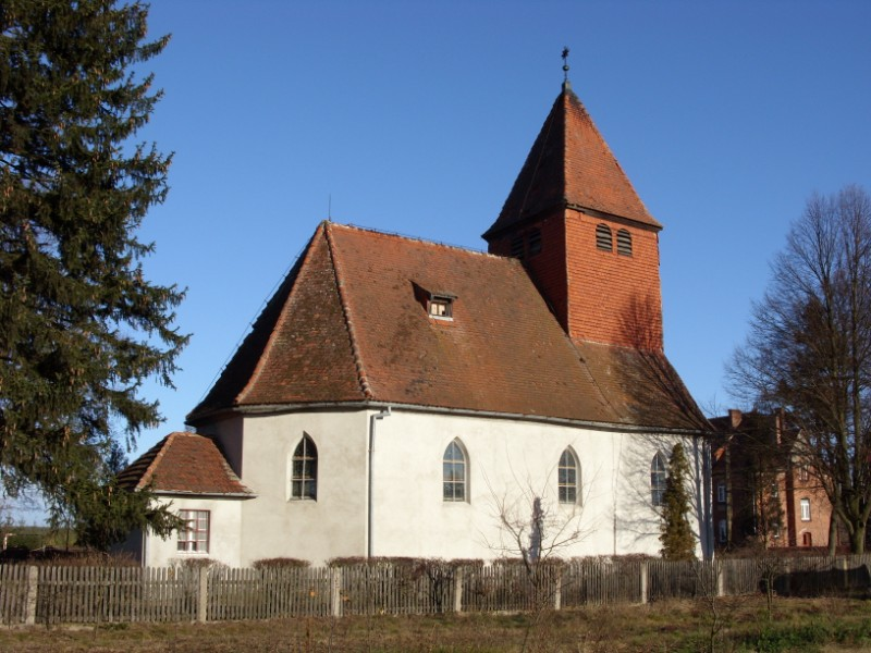 Bryńsk - kościół filialny pw. Matki Boskiej Anielskiej (zabytek nr rejestr. A-4168 and 73)